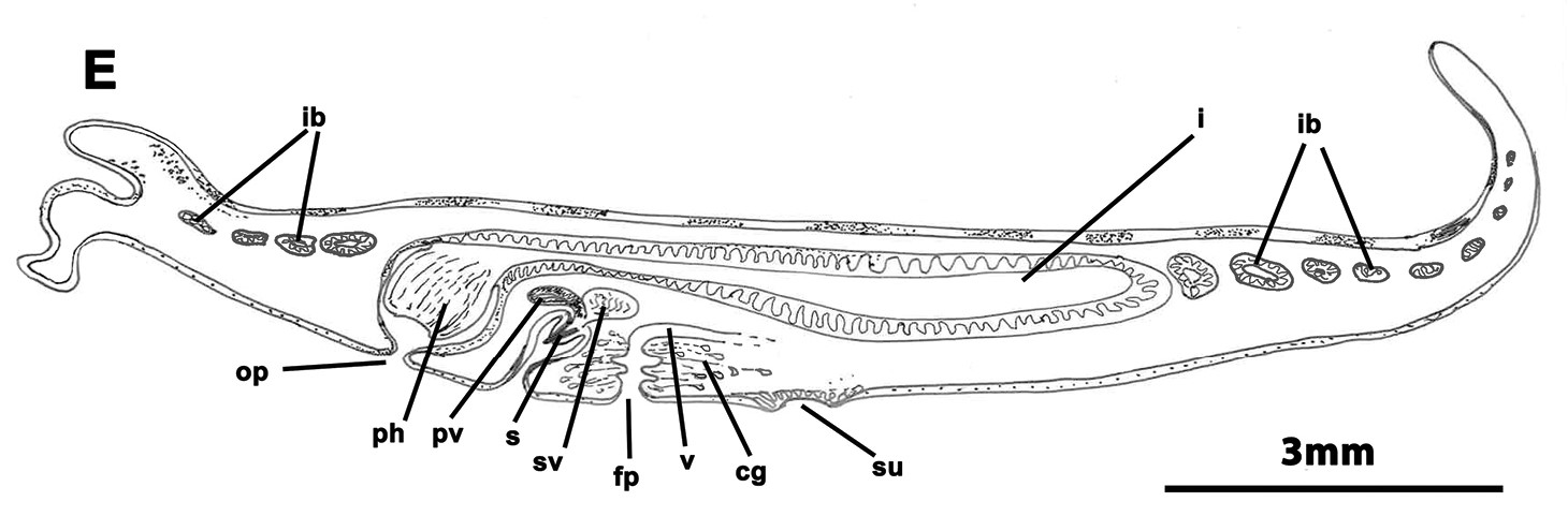 Reconstrucción de órganos de Prostheceraeus vittatus. ib: ramas intestinales; op: poro oral; ph: farínge; pv: vesícula prostática; s: estilete peniano; sv: vesícula seminal; fp: poro femenino; v: vagina; cg: glándulas de cemento; su: ventosa; i: intestino. Noreña C, Marquina D, Perez J, Almon B (2014) First records of Cotylea (Polycladida, Platyhelminthes) for the Atlantic coast of the Iberian Peninsula. ZooKeys 404: 1-22.